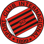 Logo: Sport Club Internacional, defunct football club, São Paulo, Brazil.